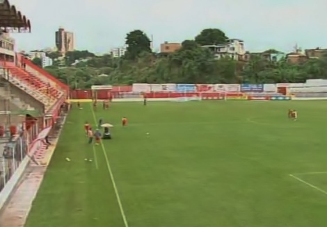 Interior do Estádio Farião em Divinópolis, Minas Gerais.